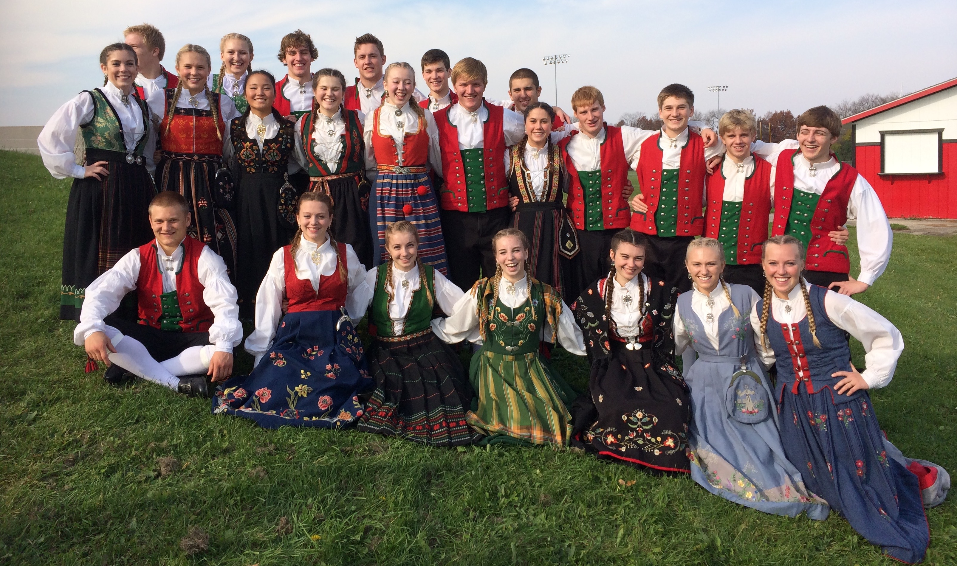 Gruppebilde av Stoughton Norwegian Dancers fra 2014.